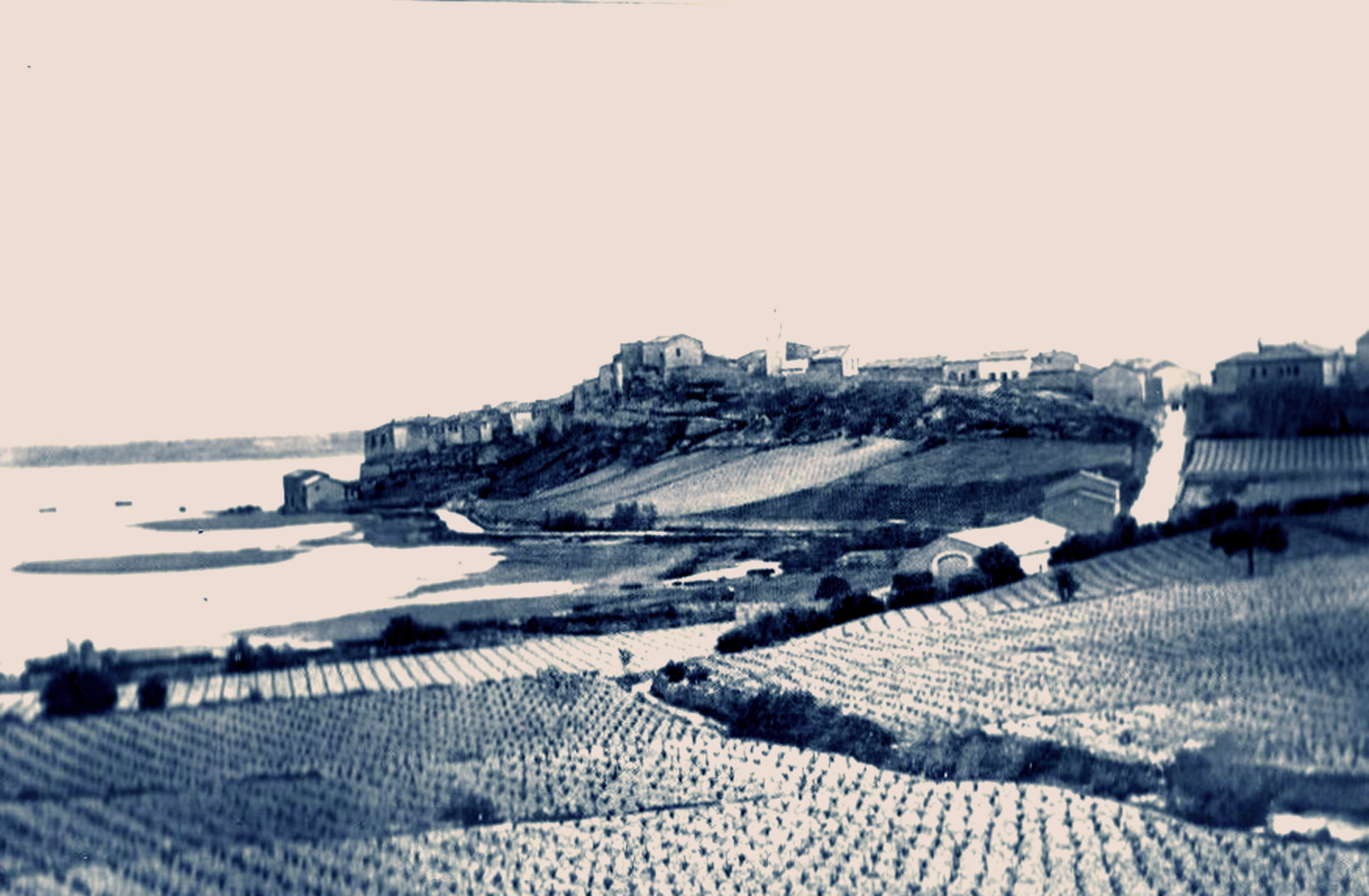 Le vignoble de Badge en 1931